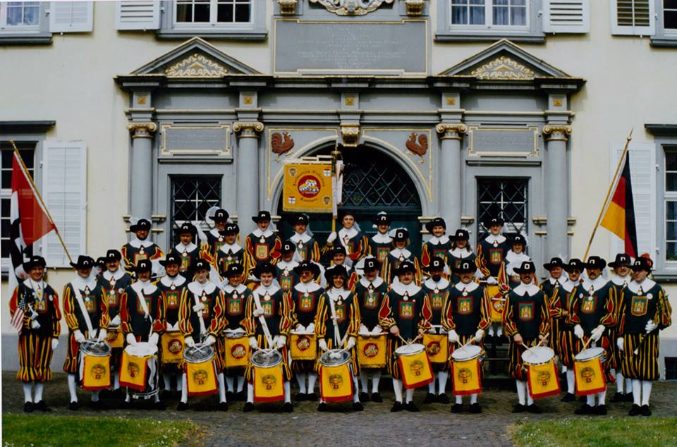 Fanfarenzug der Niederburg im Jahr 1988